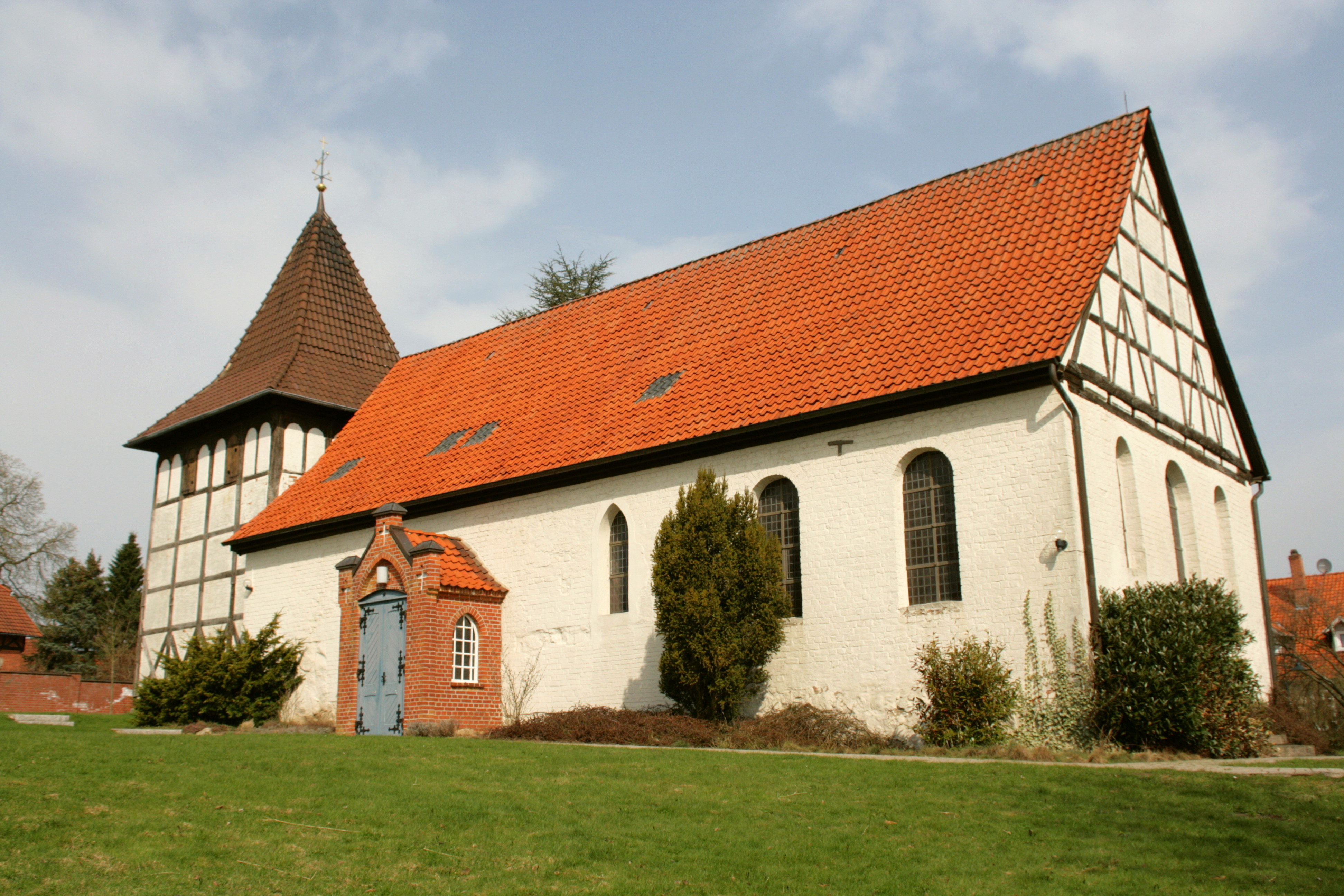 Sankt Georg, Kirchgasse in Barum (Landkreis Uelzen)